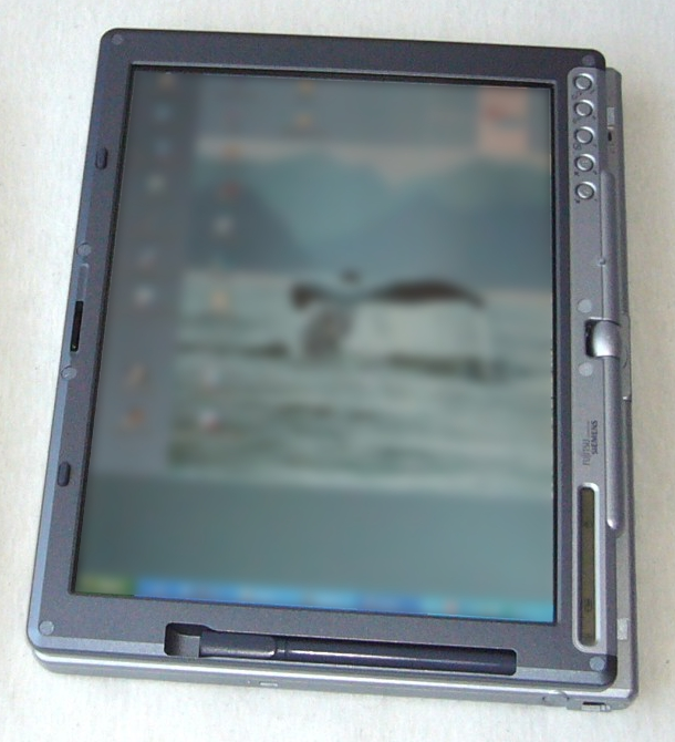 Fujitsu Siemens Lifebook T3010 tablet PC